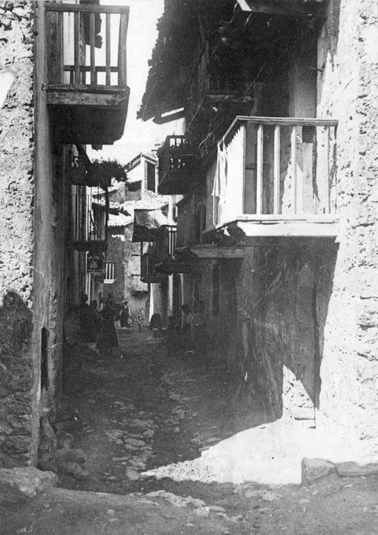 Carrer d'Organyà amb gent. Cèsar August Torras i Ferreri (Entre 1890 i 1923)